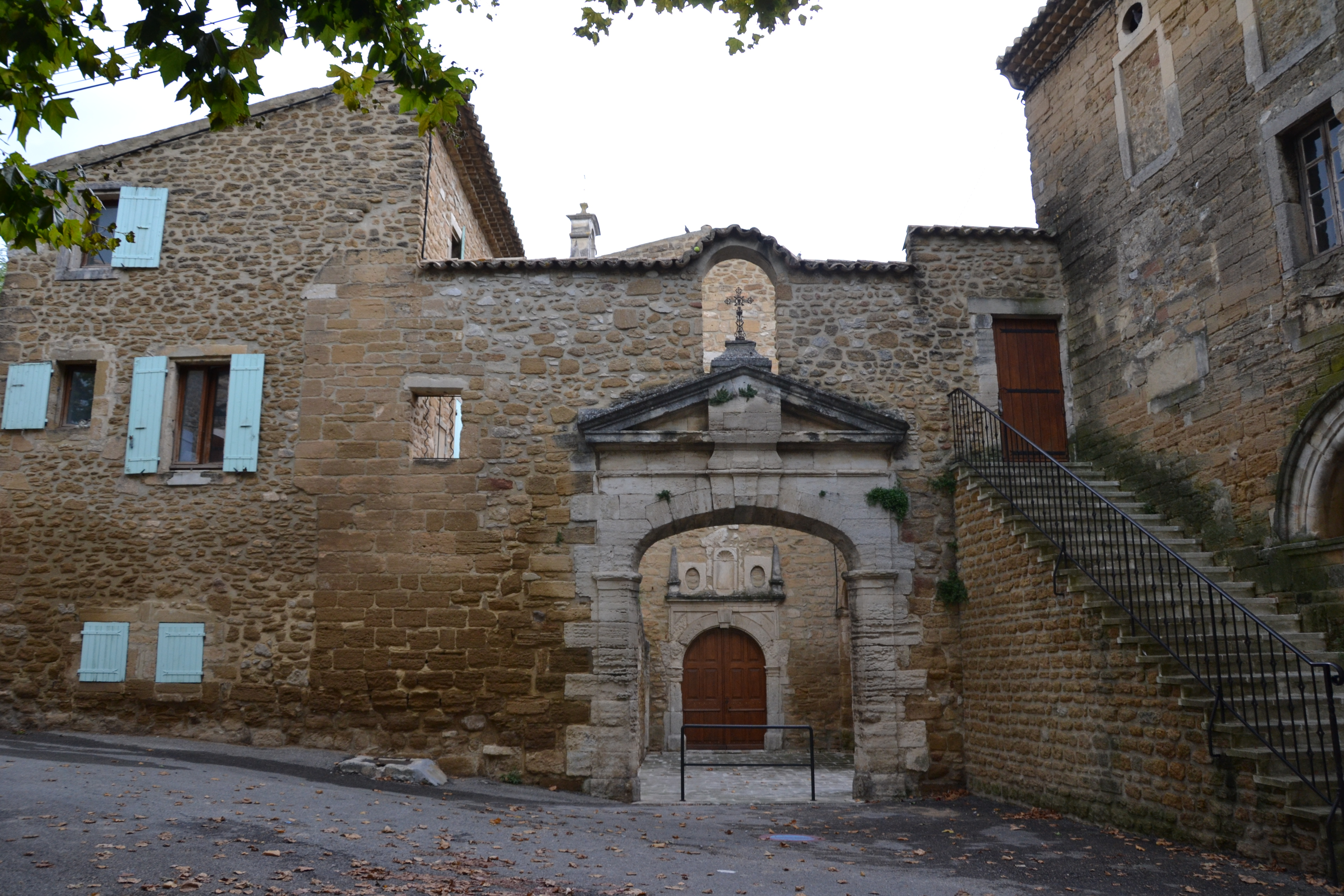 Abbaye de Bouchet (Inscription) .